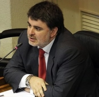 Jaime Burrrows discutiendo los cambios a la Ley Antitabaco en el Senado de Chile.